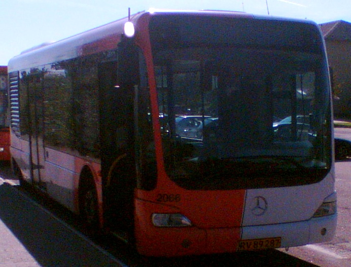 Mercedes Benz Cito i VT bemaling. Kører normalt som Bybus i Sorø.